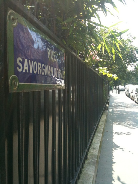 Rue Savorgnan de brazza Paris 75007